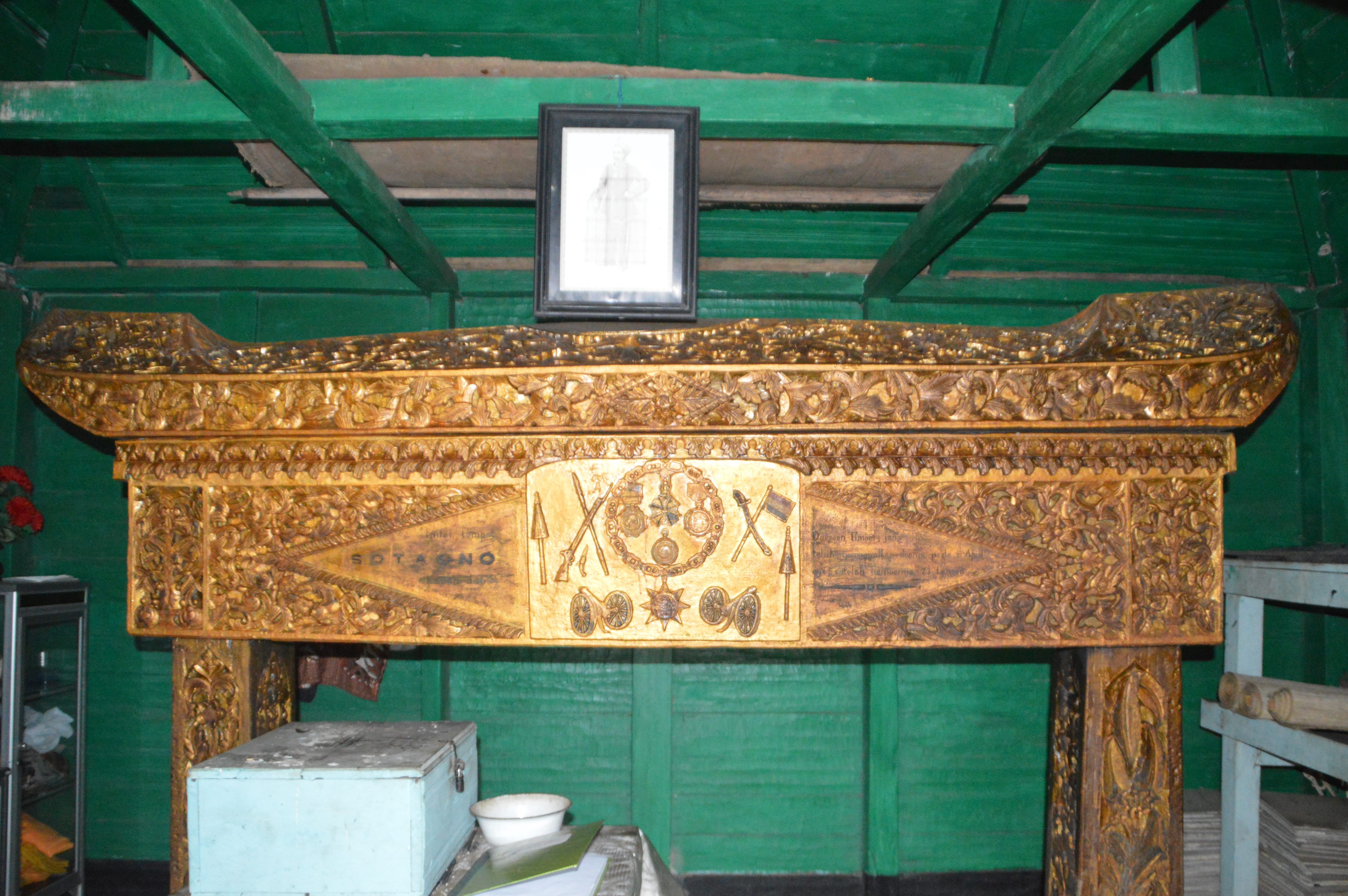 Tam'mak Mas di desa Telang, Kabupaten Barito Timur, Kalimantan Tengah. Tam'mak (kadang dieja tamak/tambak) adalah sebuah tempat menyerupai peti yang digunakan untuk meletakkan abu jenazah almarhum yang telah dikremasi setelah melalui proses Mapui di sebuah tempat bernama Papuian dalam ritual Ijam'me'.